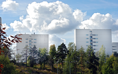 Tower buildings in Pihlajamäki